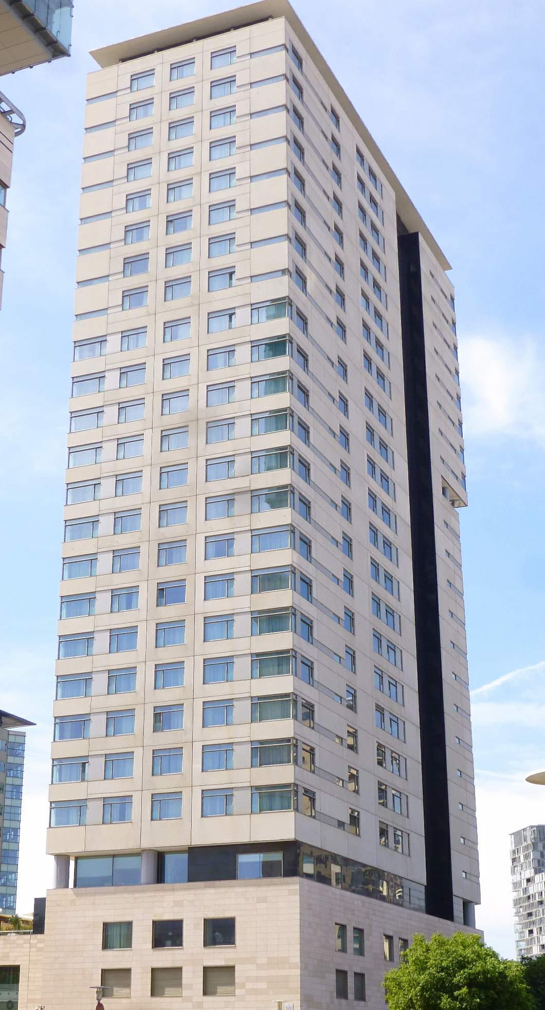 Hotel Hilton Diagonal Mar Barcelona